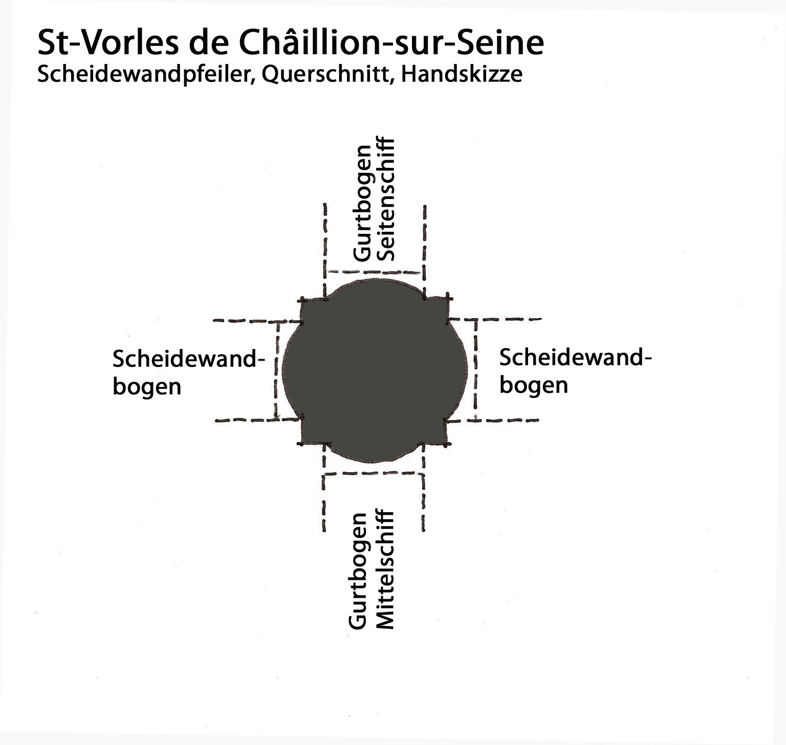 St-Vorles de Châtillon,Pfeilerquerschnitt